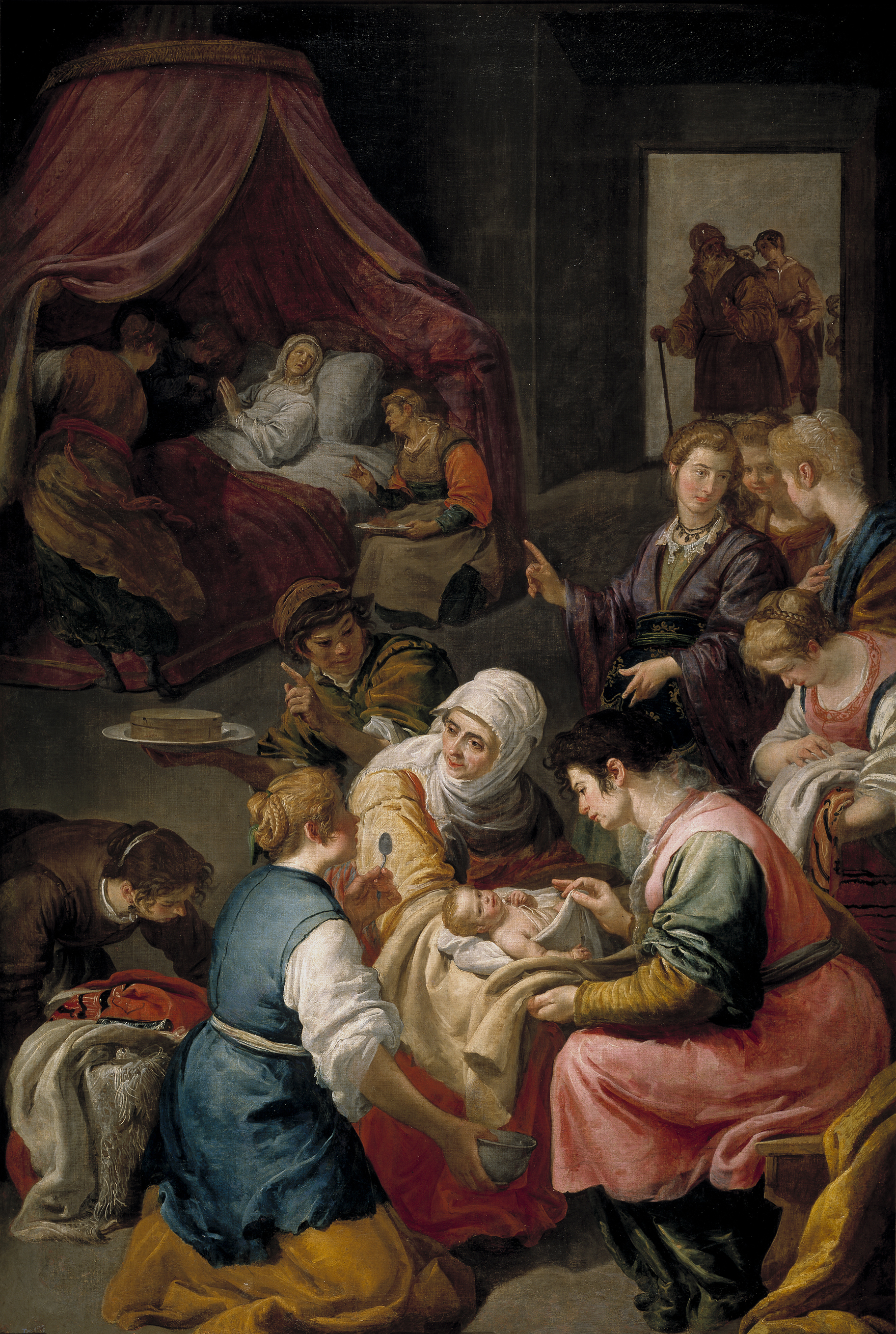 La obra representa el nacimiento de la Virgen María, madre de Jesucristo.